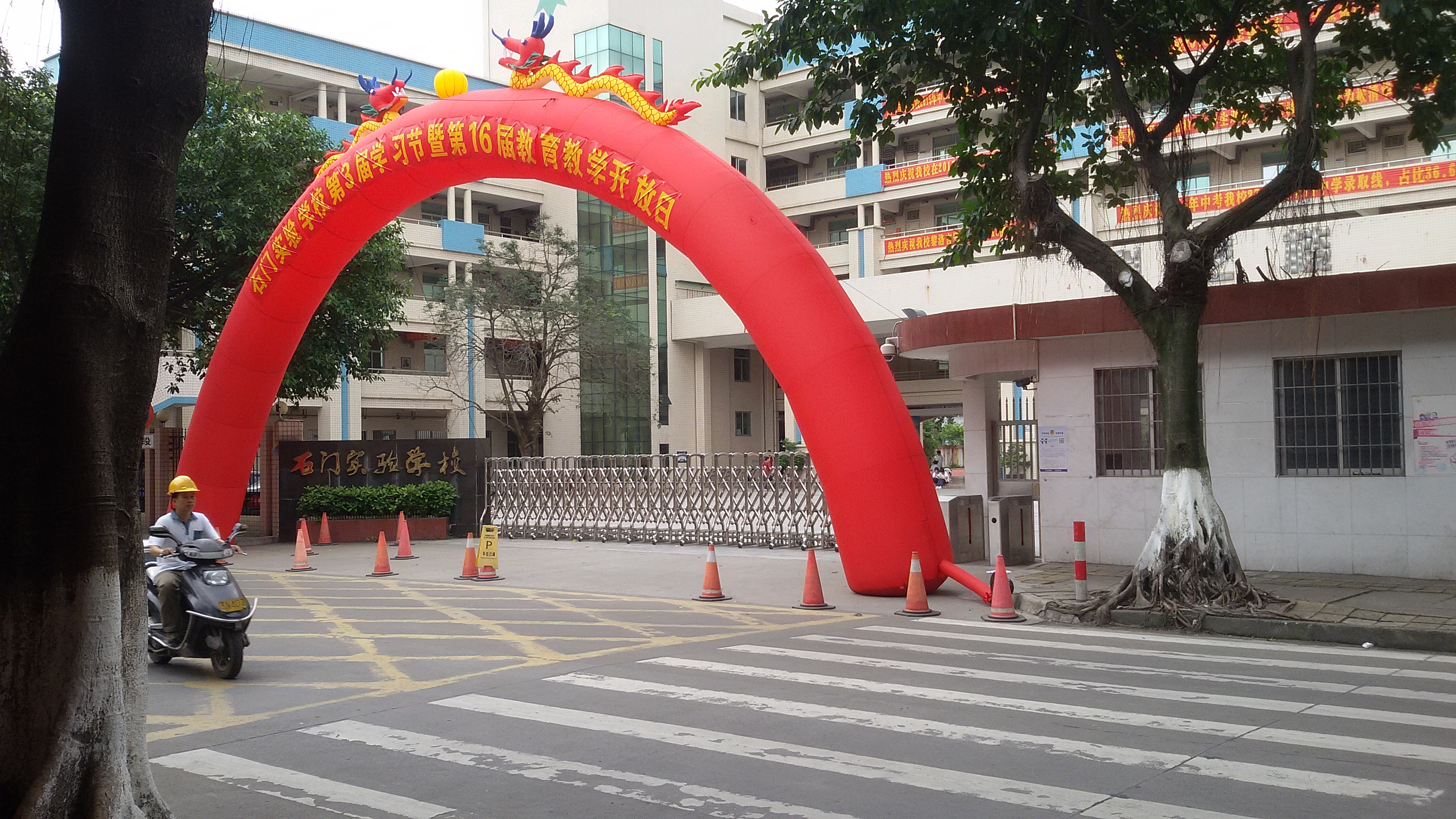 粵語: 石門實驗學校